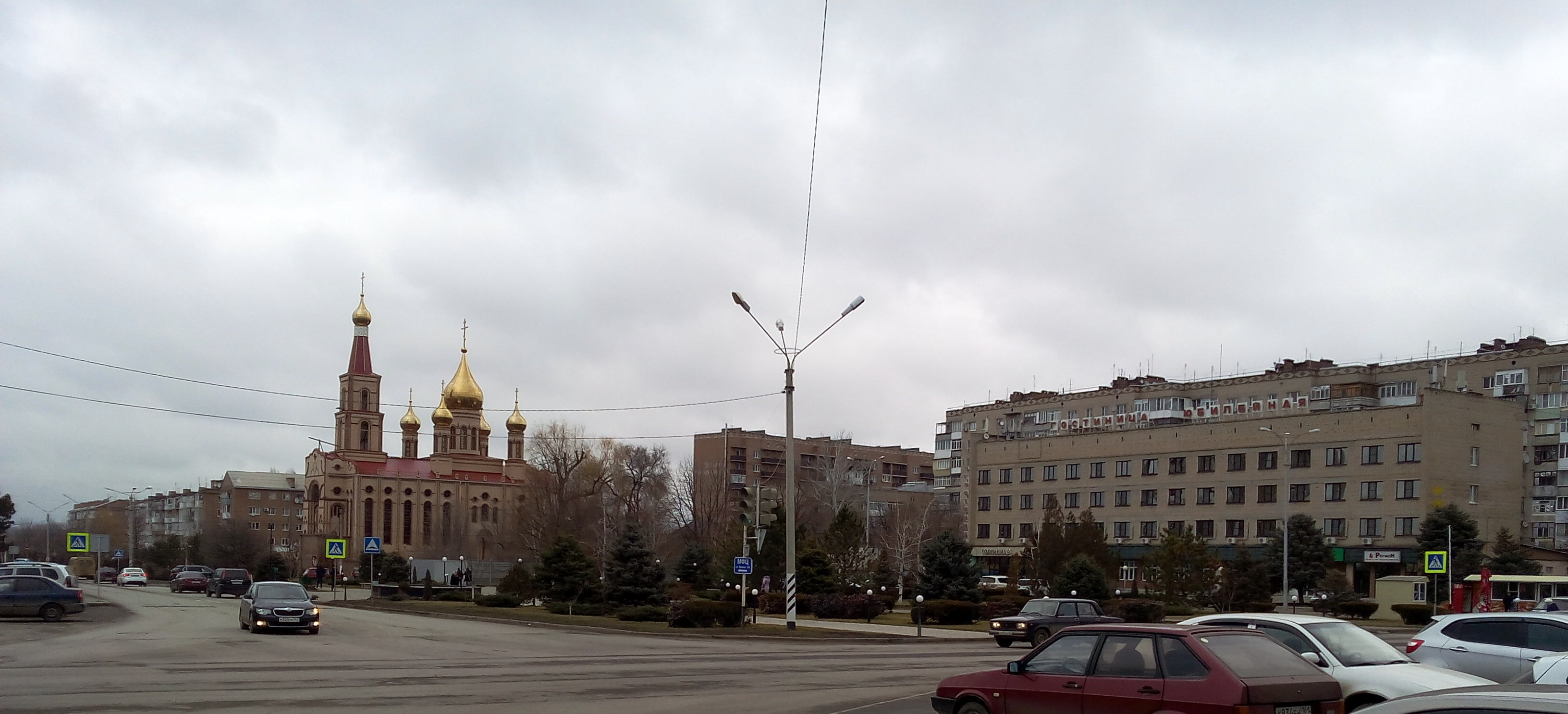 г. Сальск, площадь Юбилейная